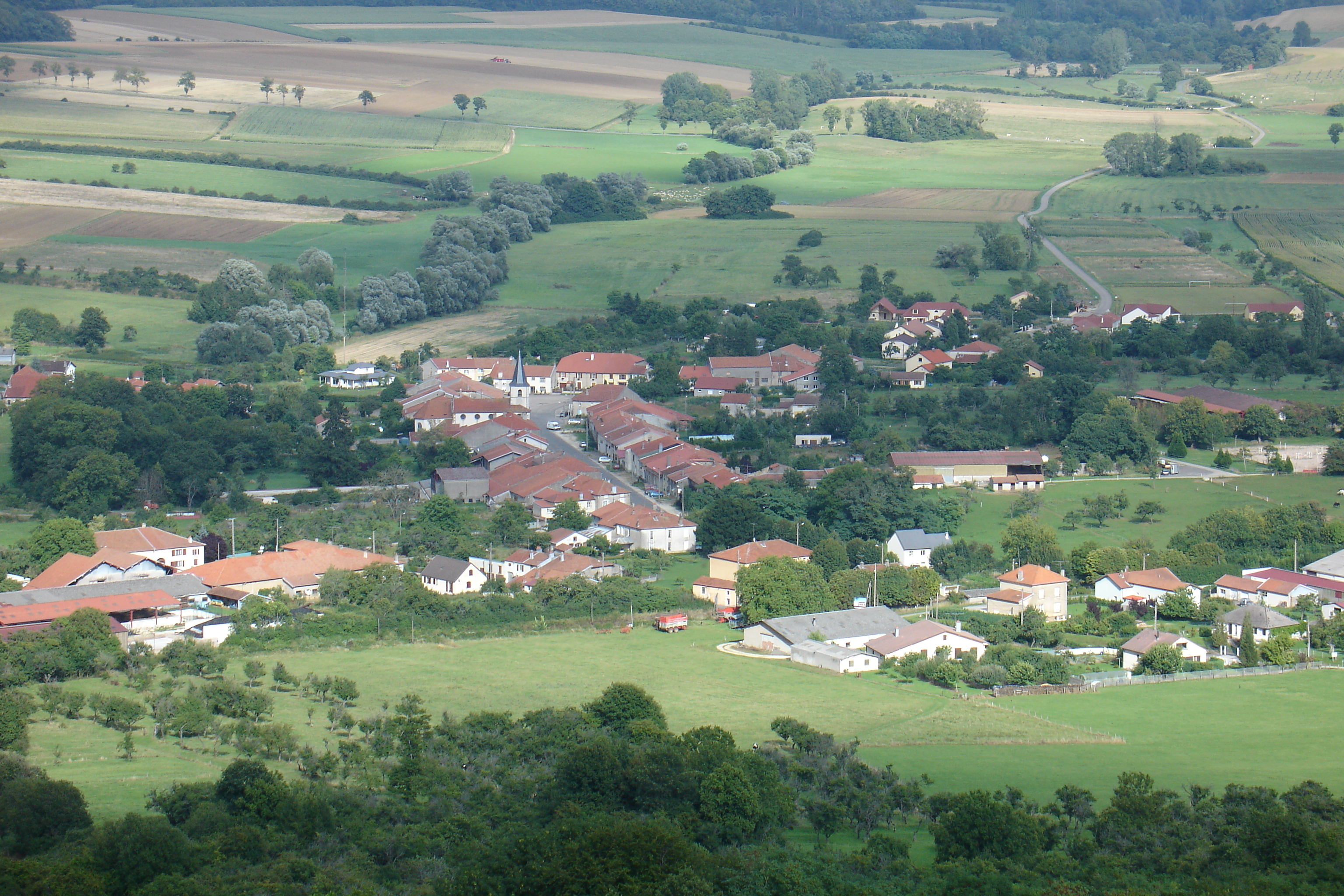 Village de Praye, Meurthe et Moselle, France, depuis la colline de Sion